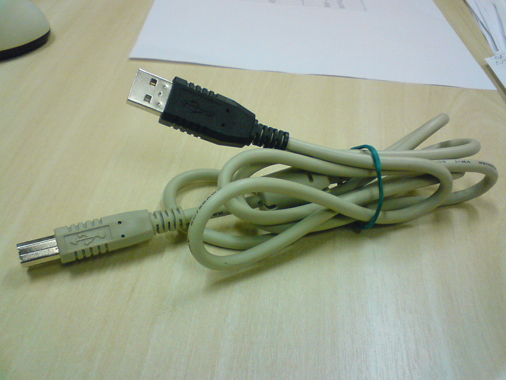 An USB cable